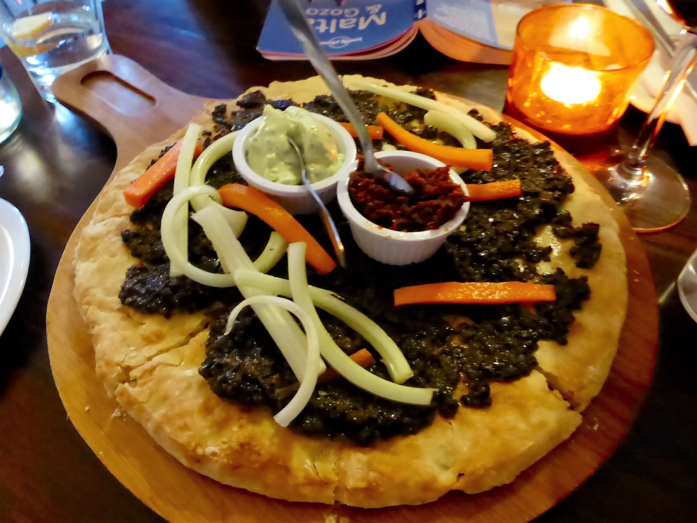 Ħobż biż-Żejt: Sauerteigbrot mit Belag; im Restaurant Cellini's in Naxxar auf Malta.